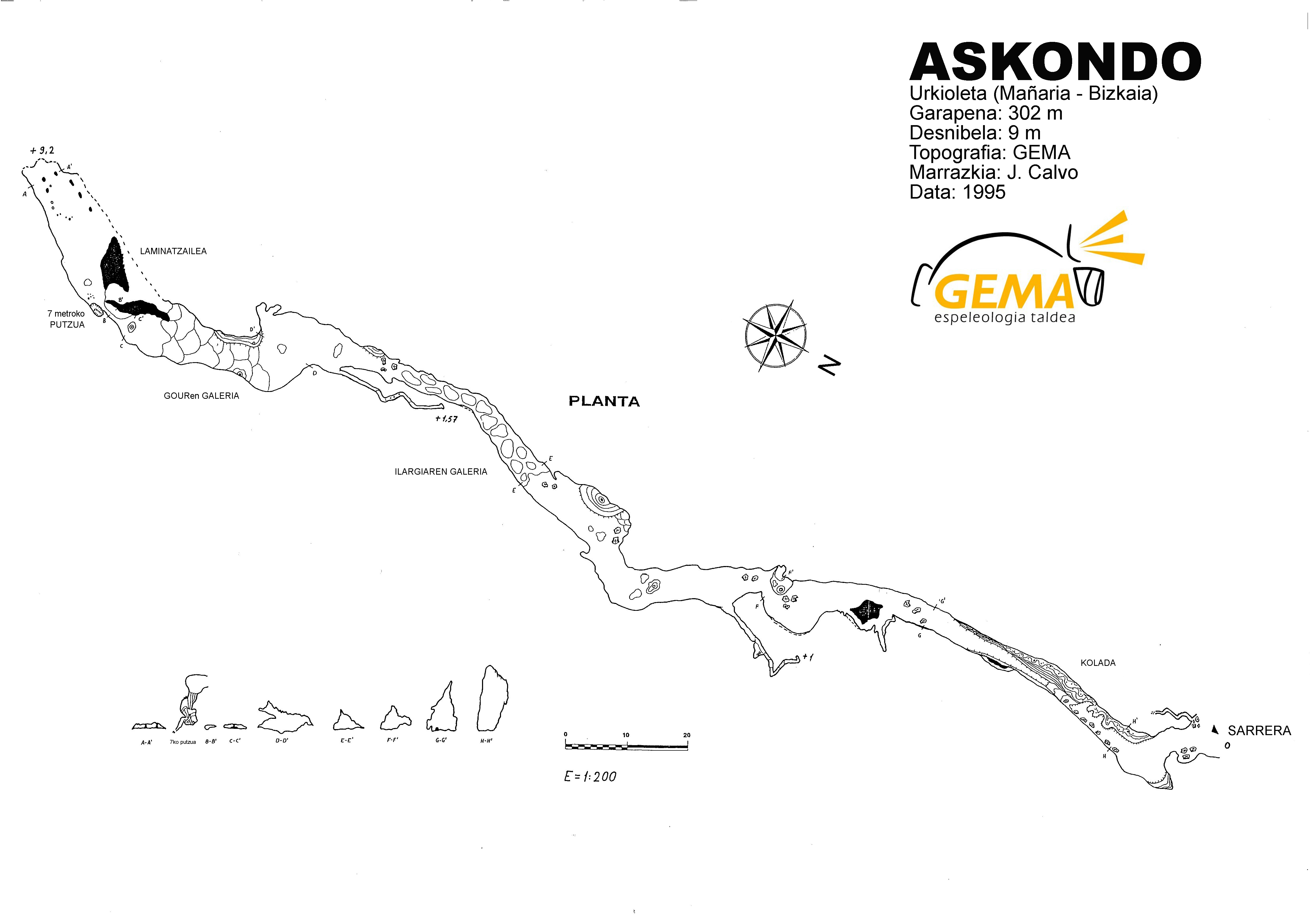 Askondoko topografia